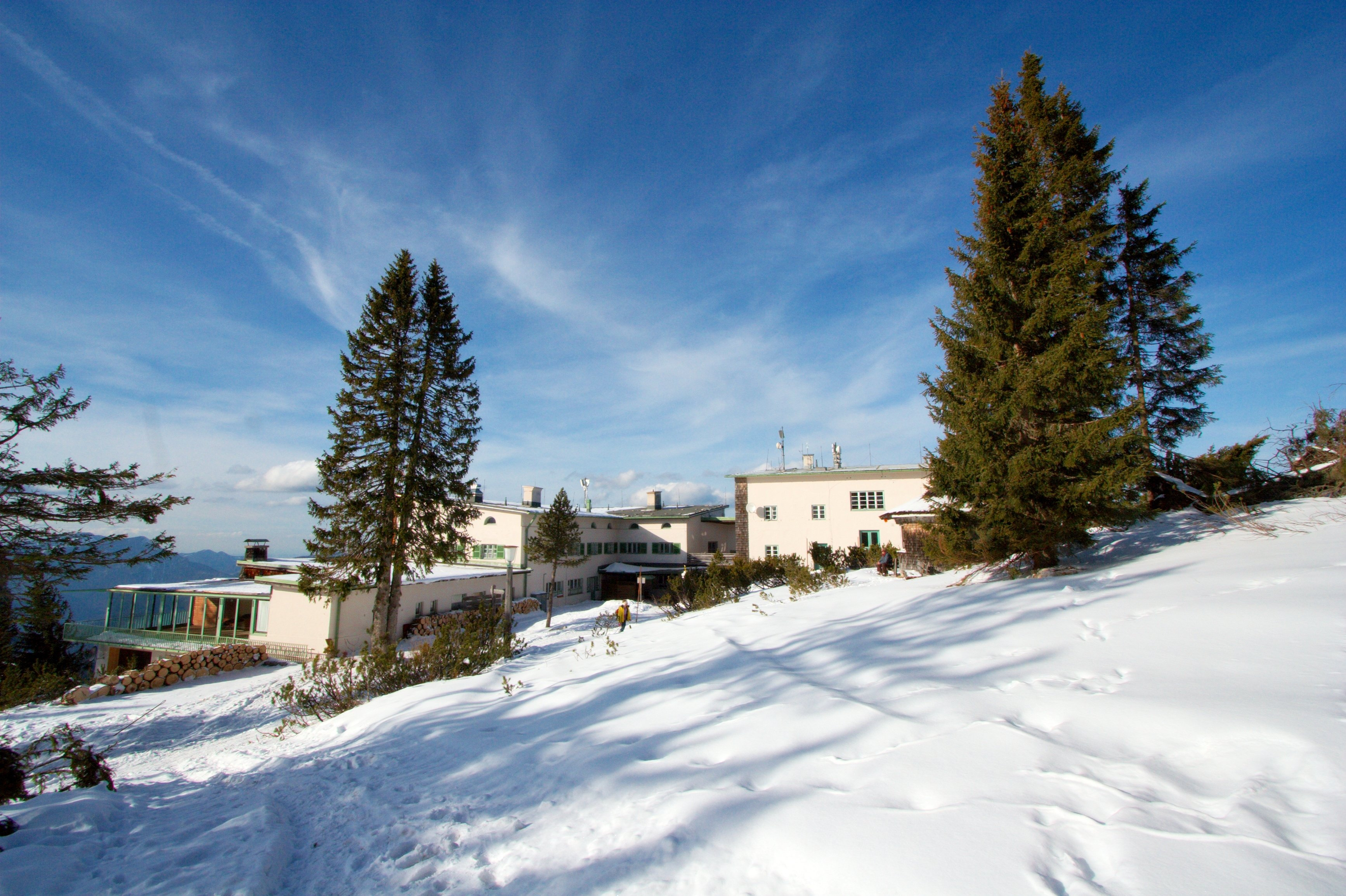 Bergstation und Hotel.